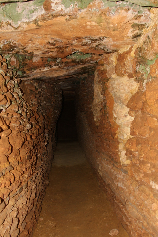 Interior del dolmen del Vaquero